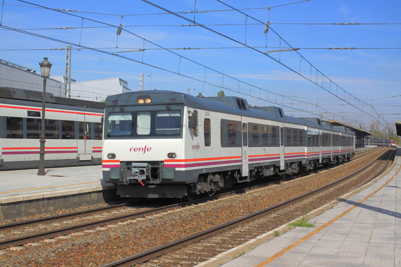 Estación de Aranjuez. Automotor S/592 con MD a Valencia via Cuenca.